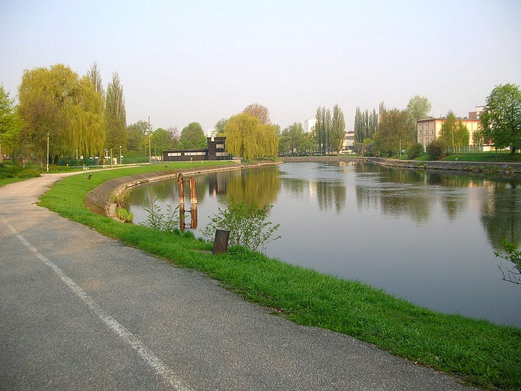 Brda w Bydgoszczy - Babia Wieś